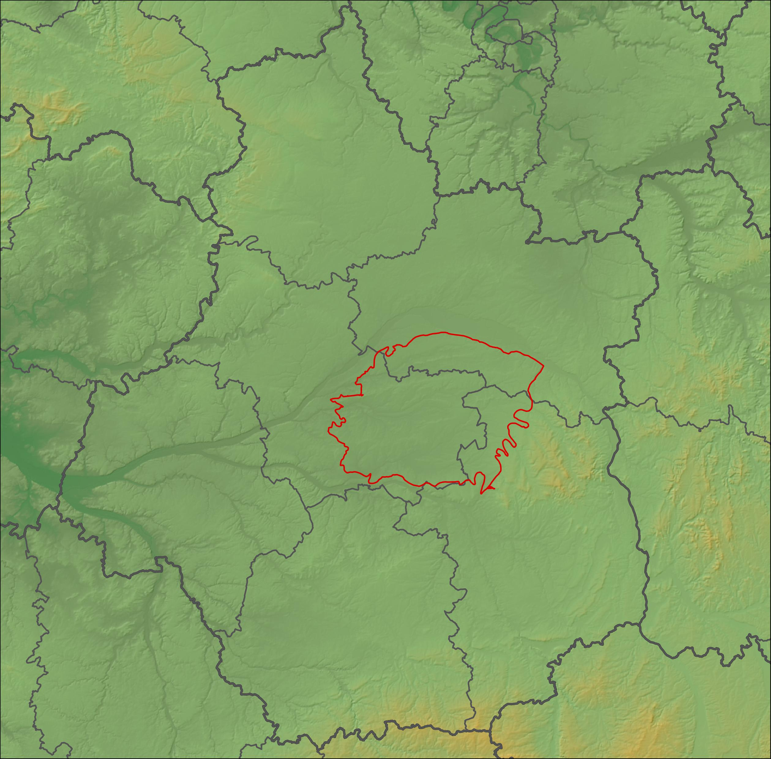 Localisation du site Natura 2000 "La Sologne" sur fond topographique (BD ALTI de l'IGN) avec figuration des départements.